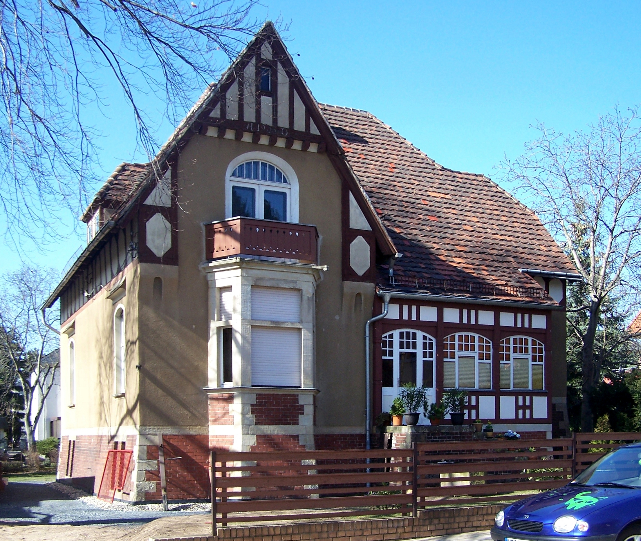 Wasastr. 55 in Radebeul